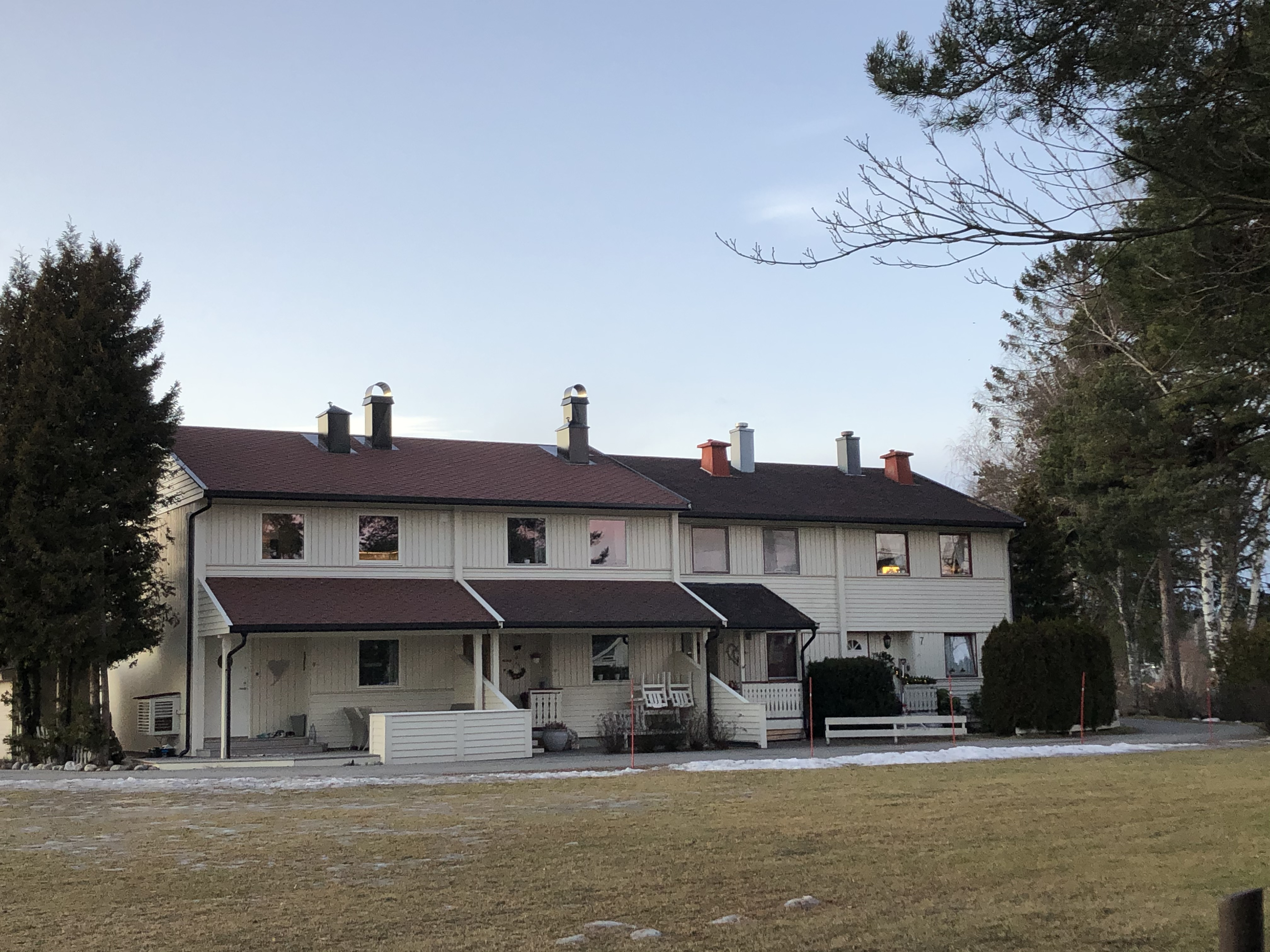 Veienmoen 1-5-7, Hønefoss